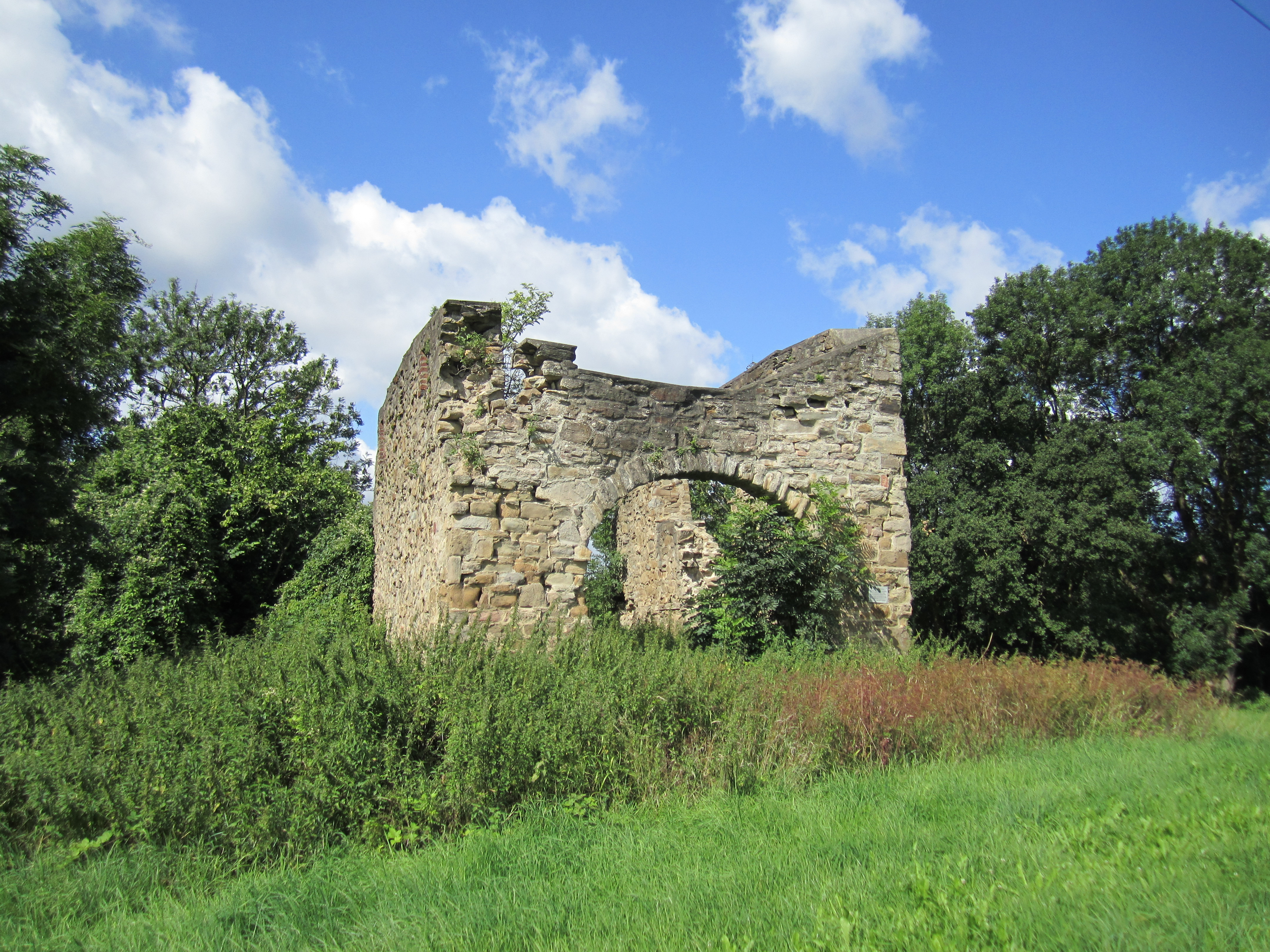 Denkmalgeschützte Ruine Haus Berchum in Hagen-Berchum, Am Kleff. Die zum Nieder- bzw. Landadel gehörenden Herren von Berchum werden erstmals 1243 erwähnt. Nach verschiedenen niederadeligen Besitzern verfiel ab dem 16./17. Jahrhundert Haus Berchum immer mehr. Die verfallenen Gebäude wurden im 19. Jahrhundert abgetragen. Ein spärlicher Gebäuderest diente zuletzt noch als Speicher. Dessen Ruine wurde 1971 mit finanzieller Hilfe des Landeskonservators restauriert. Der abgebildete Bereich liegt im Landschaftsschutzgebiet „Berchumer Heide, Reher Heide“. This is a photograph of an architectural monument.